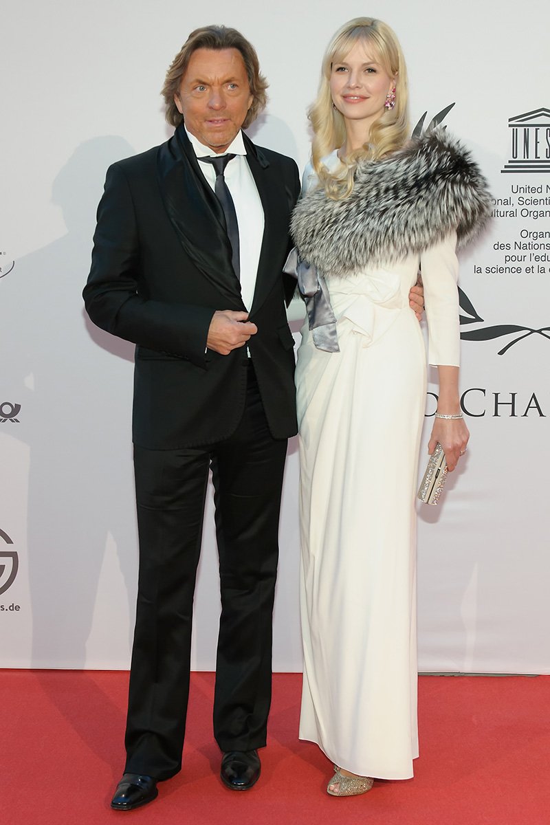 Otto Kern mit Ehefrau Naomi Valeska auf der 21. UNESCO Charity Gala am 27. Oktober 2012 in Düsseldorf.